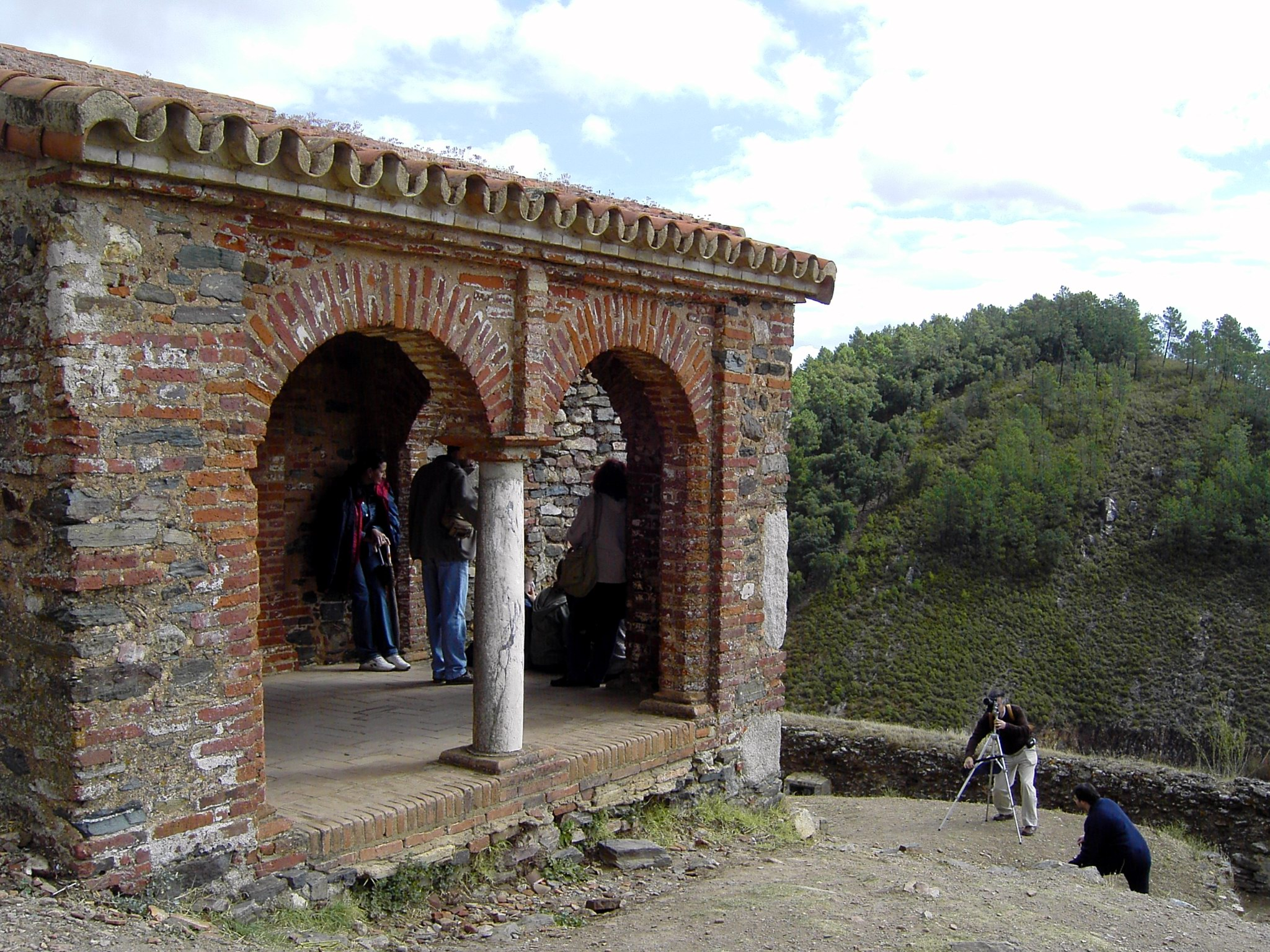 Mezquita de Almonaster, Huelva (España)